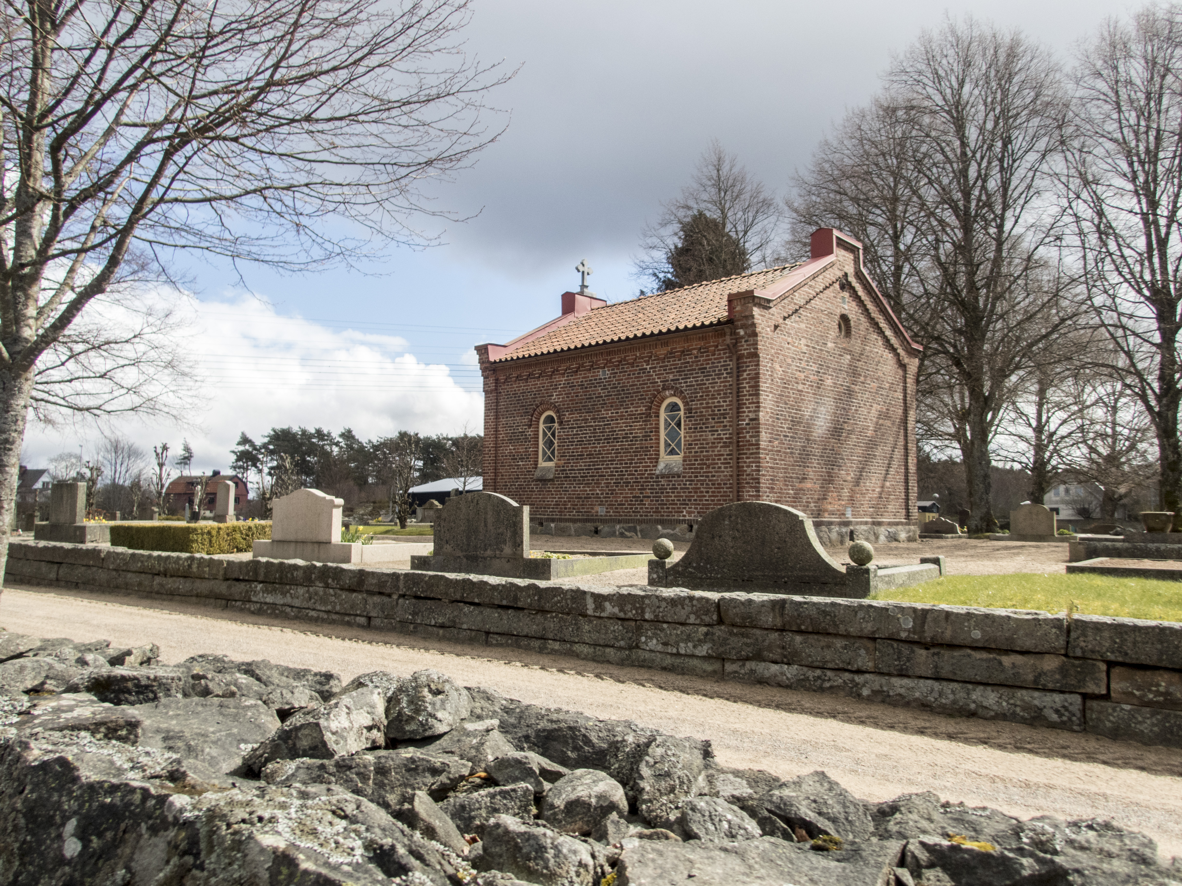 Kikås bisättningskapell, uppfört 1887